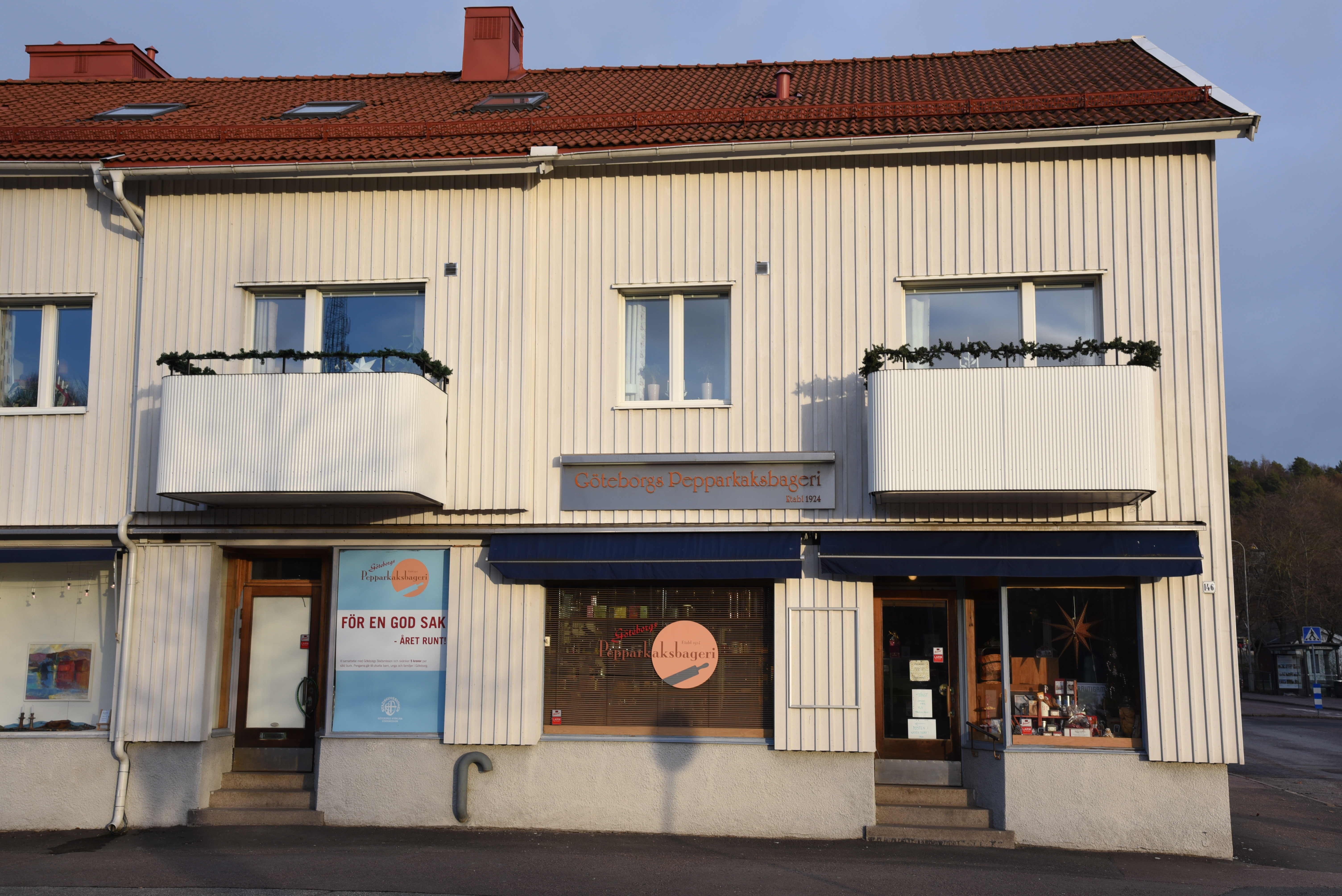 Göteborgs pepparkaksbageri vid Sankt Sigfridsgatan 146 i stadsdelen Skår i Göteborg.